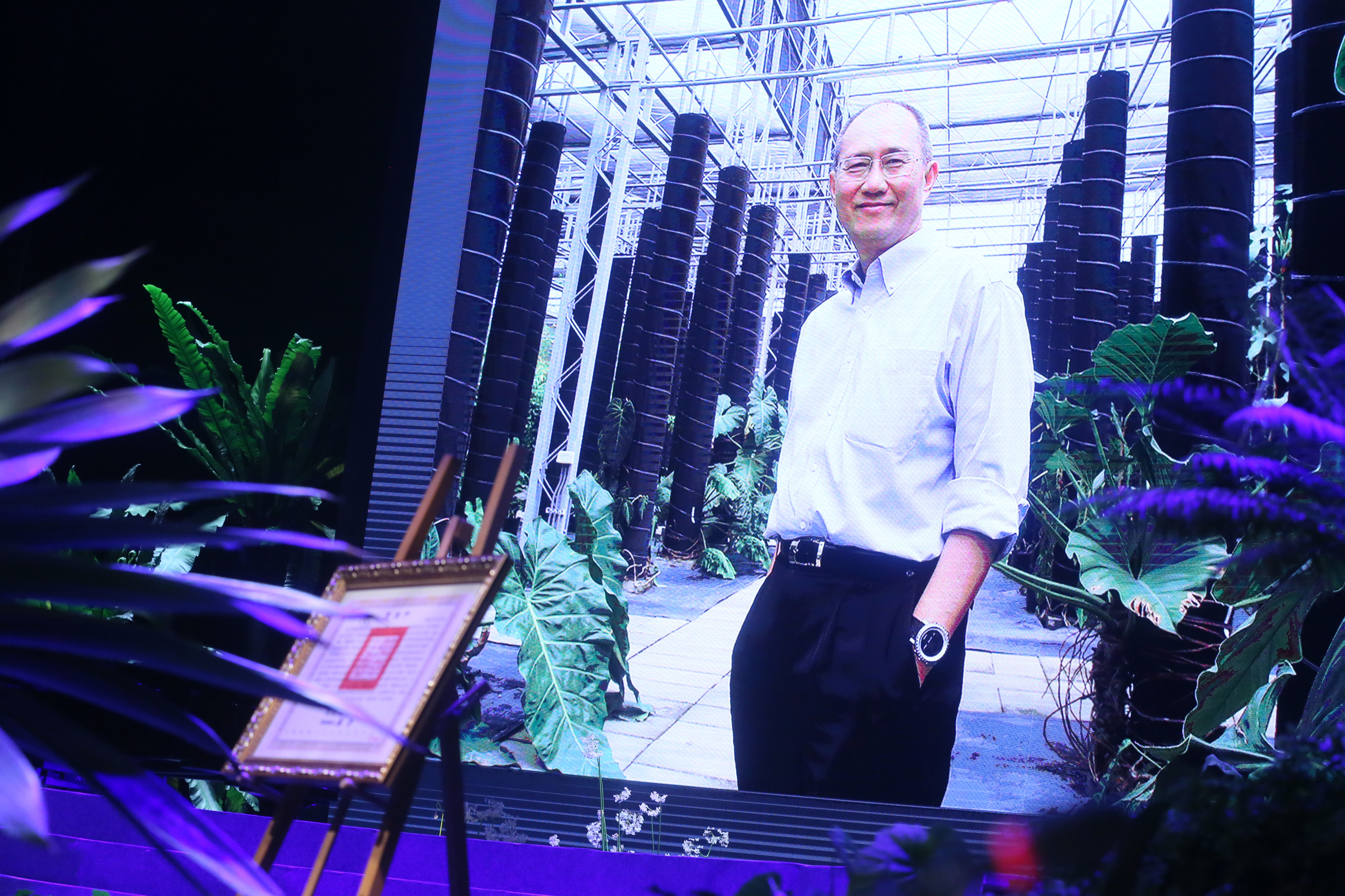 前台泥企業團董事長辜成允懷念音樂會，辜成允遺照（右）與中華民國總統蔡英文頒贈的辜成允褒揚令（左）。